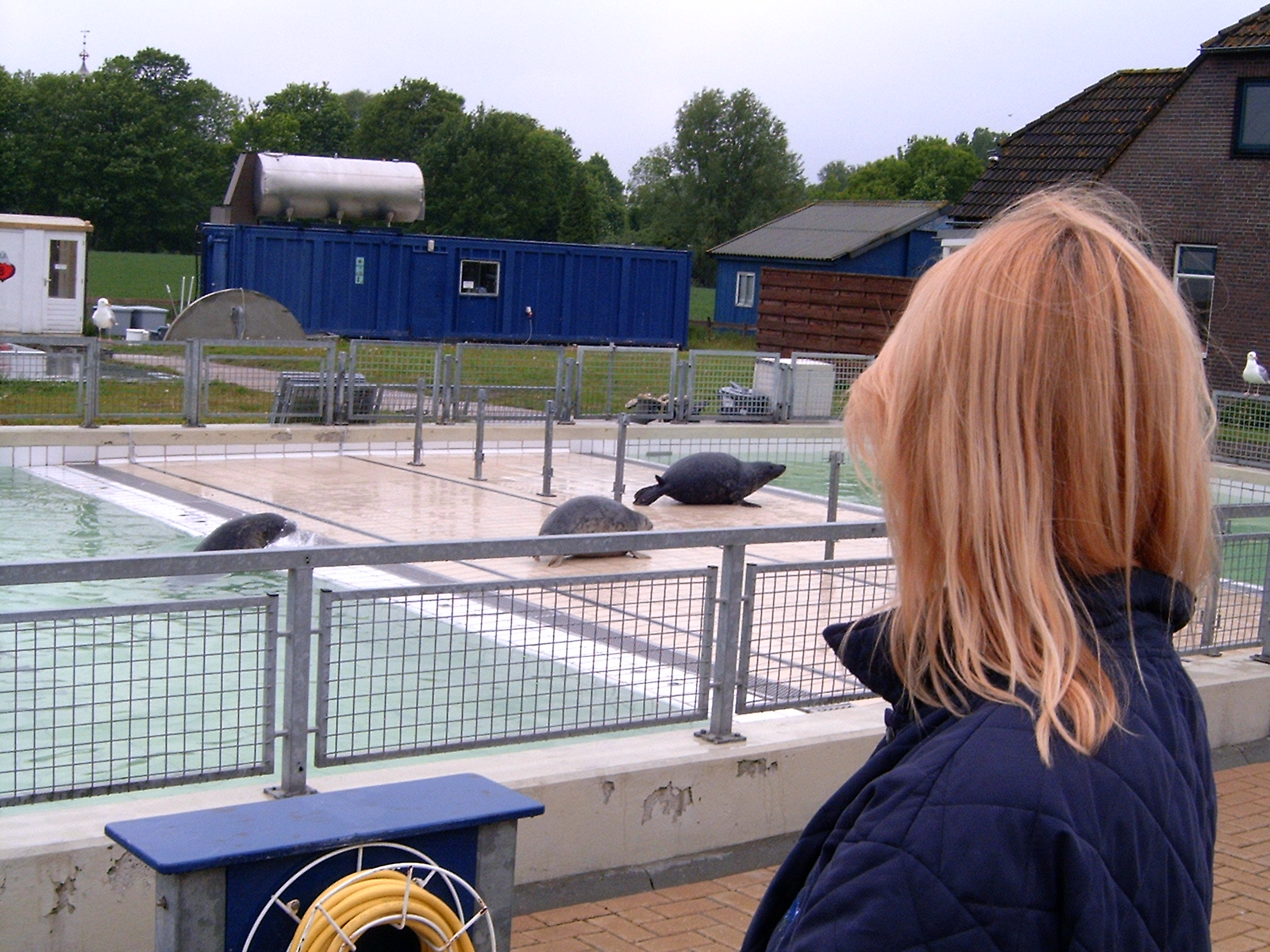 Seals in Pieterburen 2